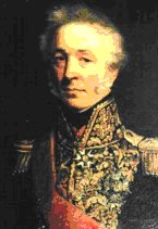 Général_Marie_Etienne_de_Barbot